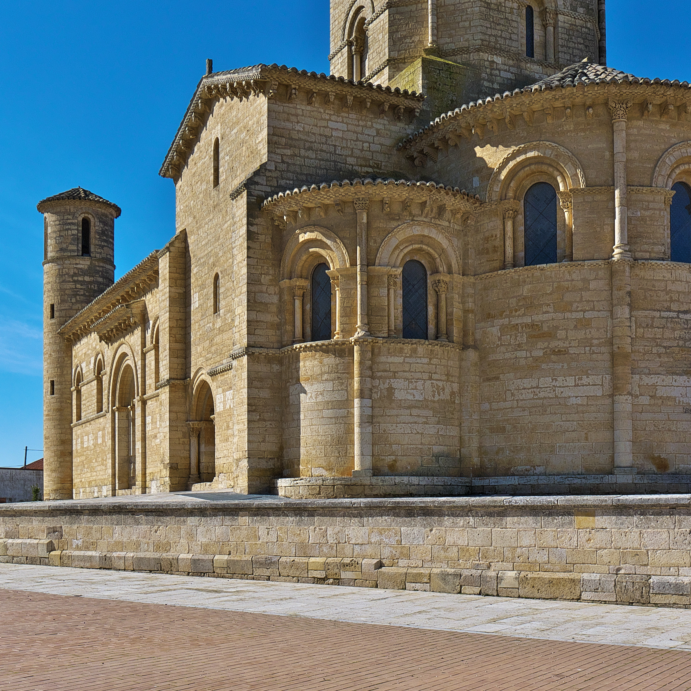 Muniadona de Castilla (995-1066) funda el Monasterio de San Martín de Tours.